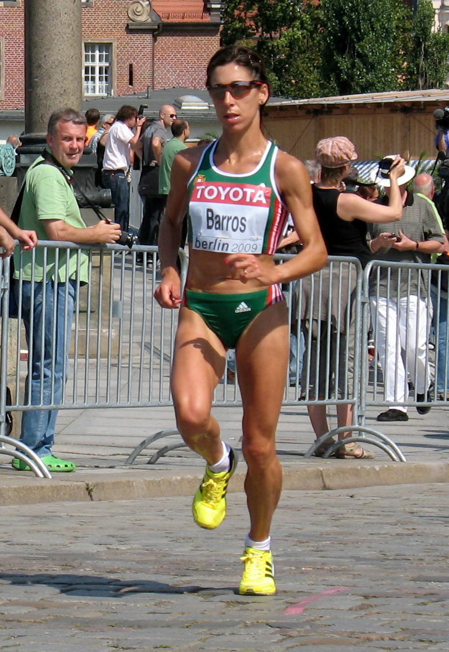 Marisa Barros in Berlin, 23.08.2009